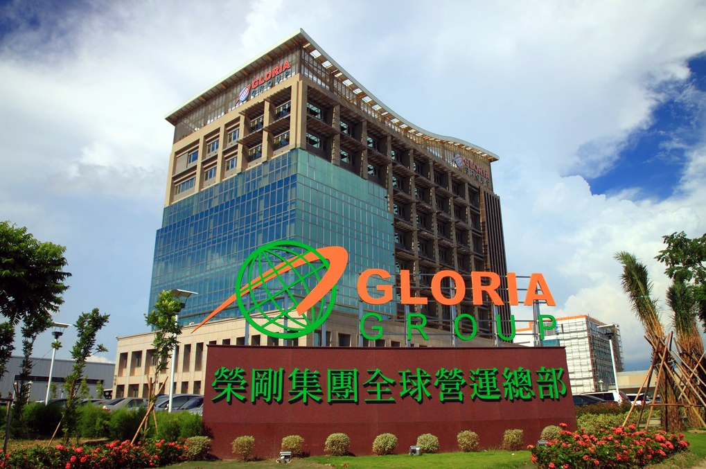 榮剛集團全球營運總部位於台南市柳營區工二路10號。